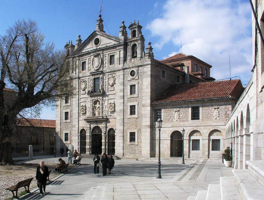 Convento de Santa Teresa, Ávila de los Caballeros, Spain